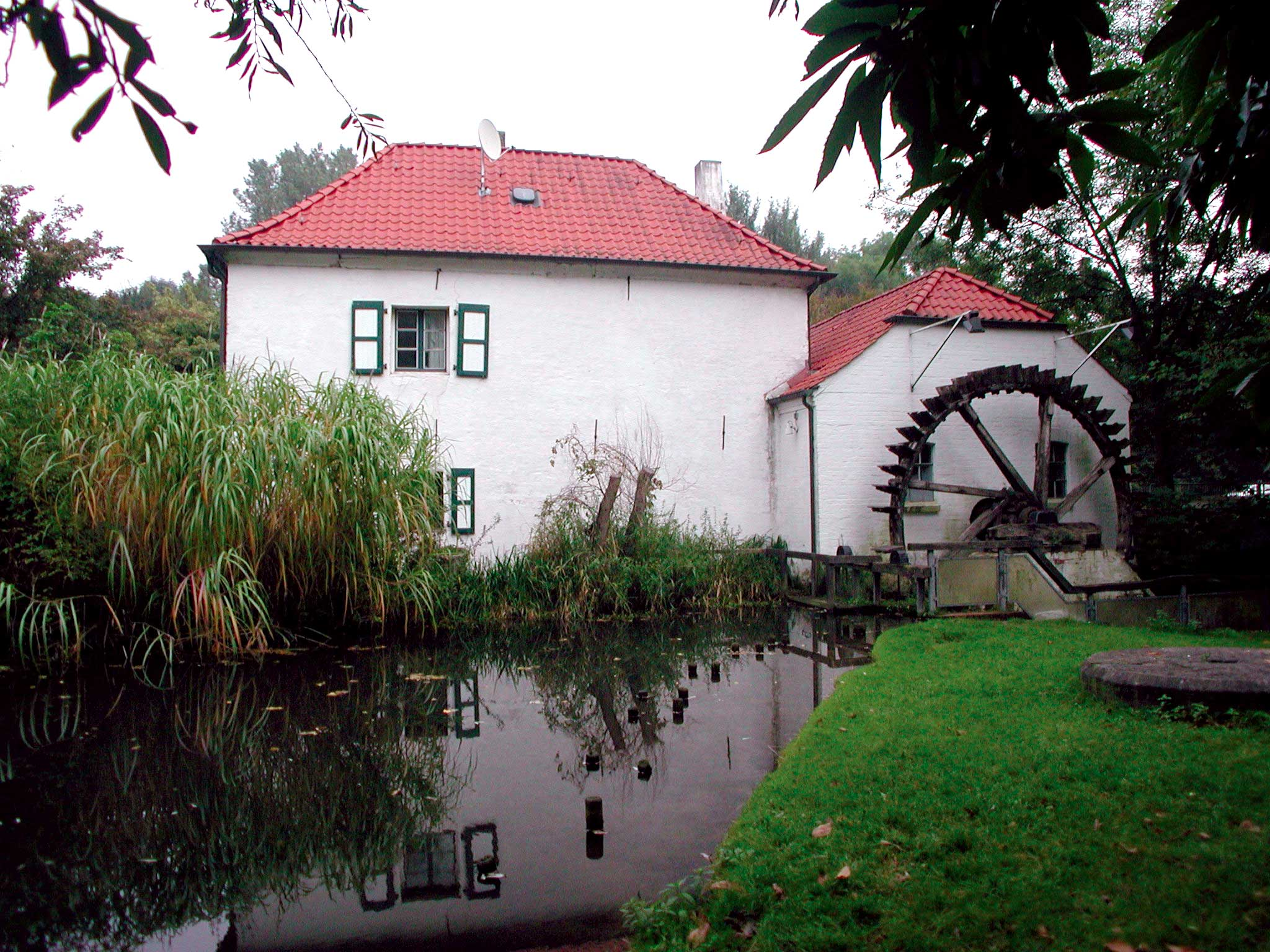 Die Aumühle ist eine alte Wassermühle in Moers, die heute kulturell genutzt wird. This image shows a heritage building in Germany, located in the North Rhine-Westphalian city Moers (no. 16).